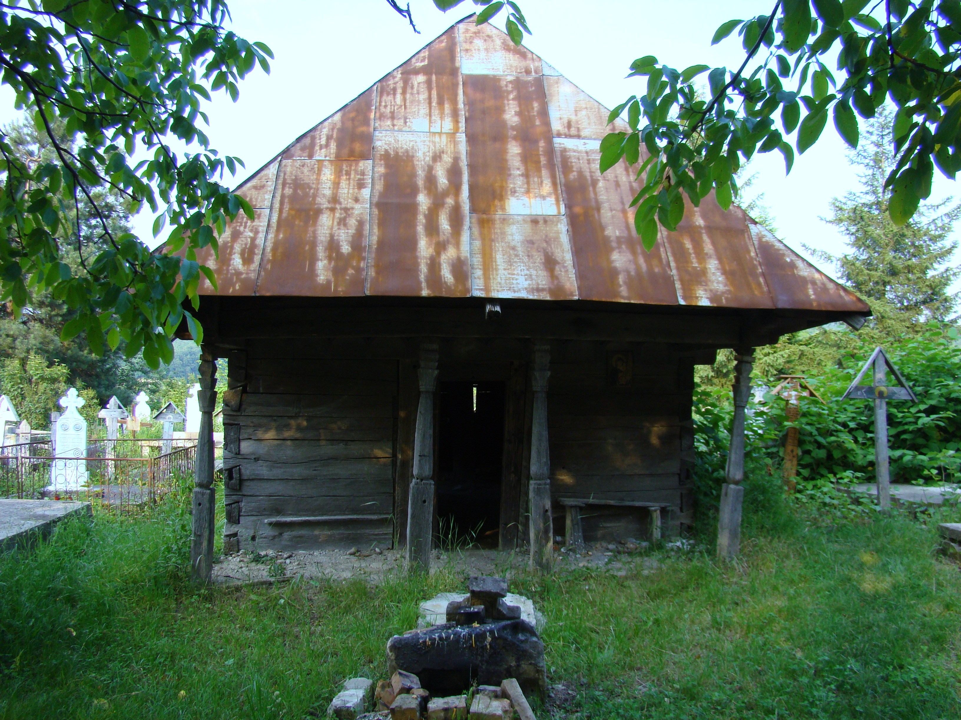 Biserica de lemn „Sf.Voievozi”, sat Pârâu Viu, cătun Glăveni, județul Gorj